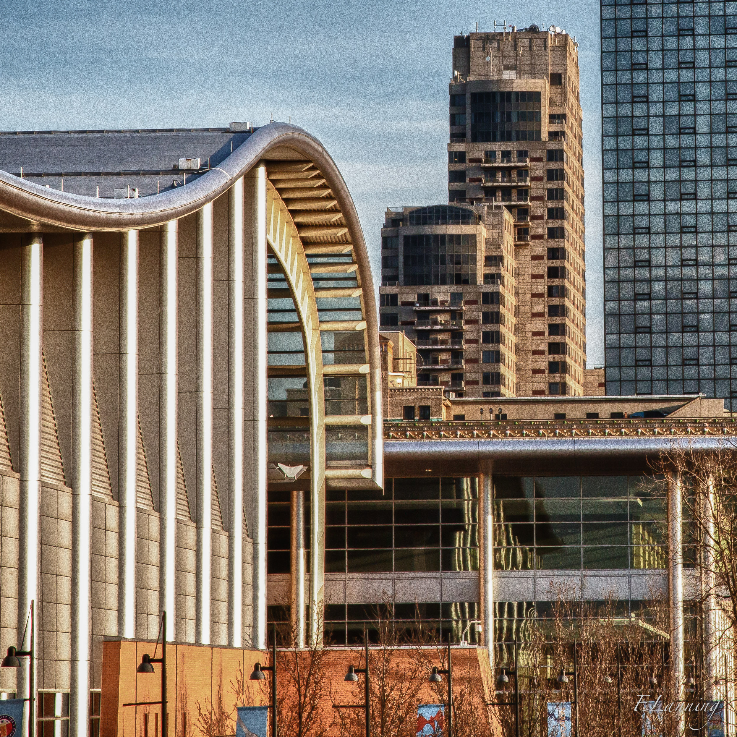 Line study